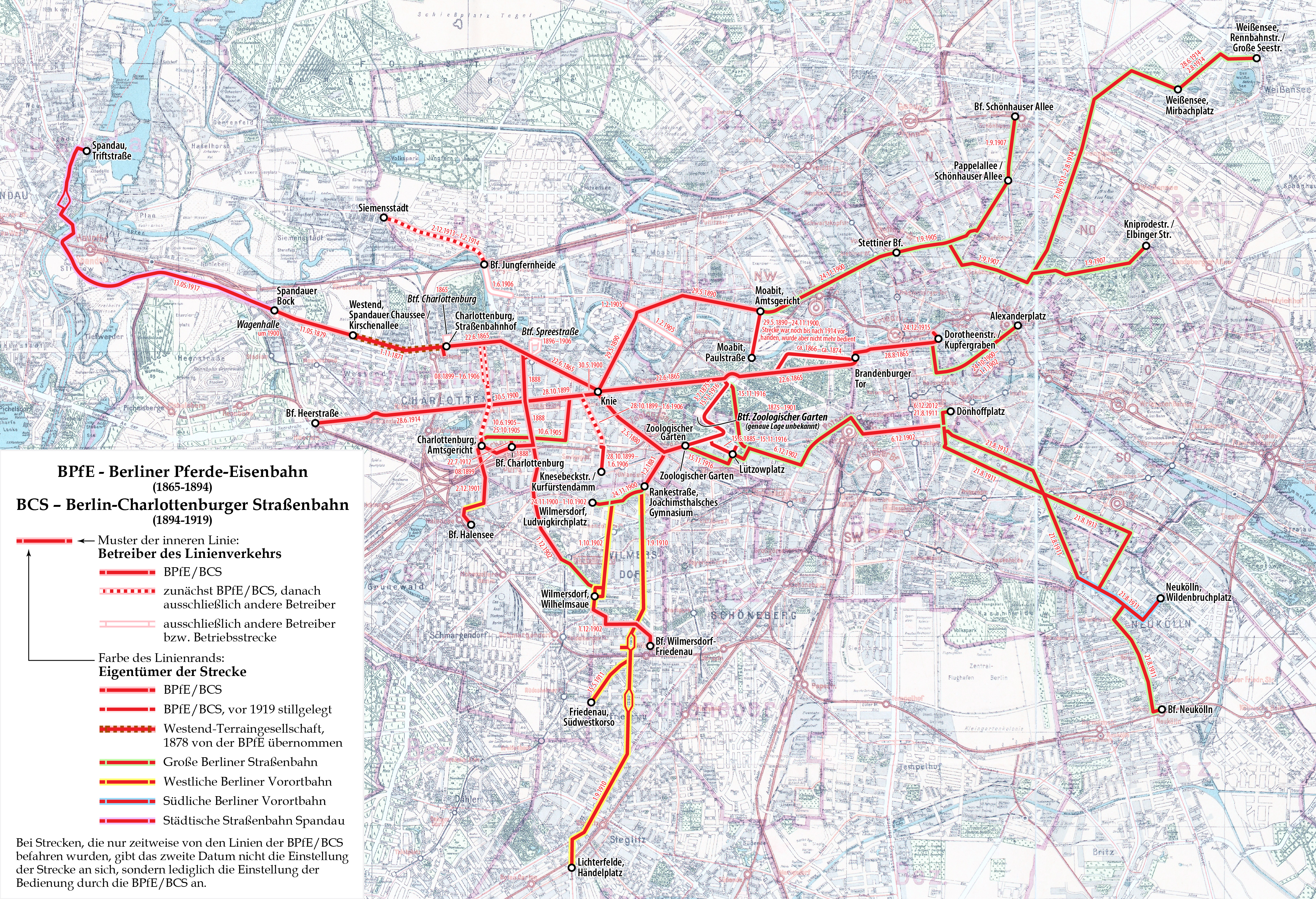 Karte der Berlin-Charlottenburger Straßenbahn (BCS)